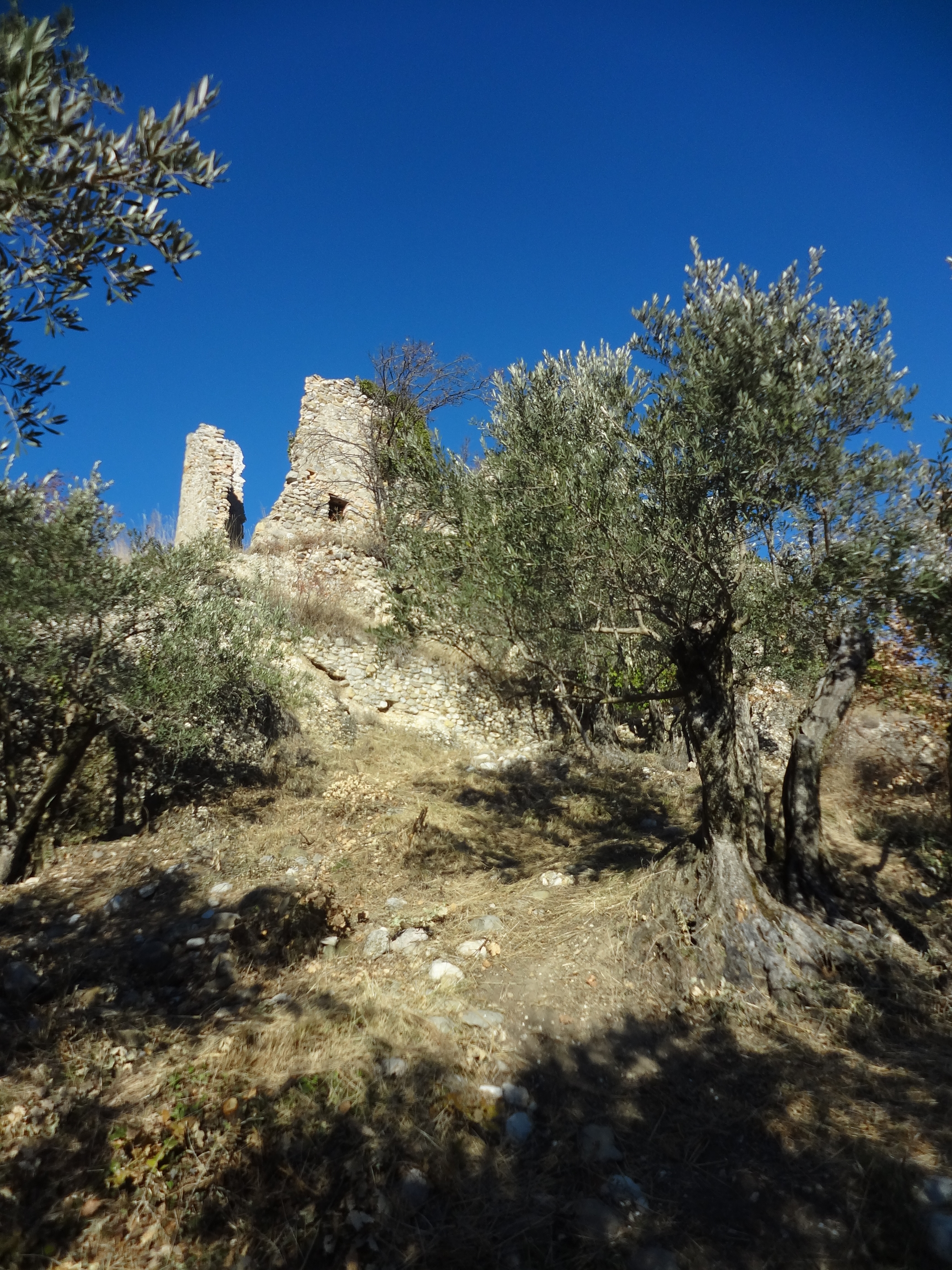 Oliviers situés en limite altitudinale, un peu en-dessous de 650 m d'altitude, sur un versant sud, sous les ruines de Lagremuse.